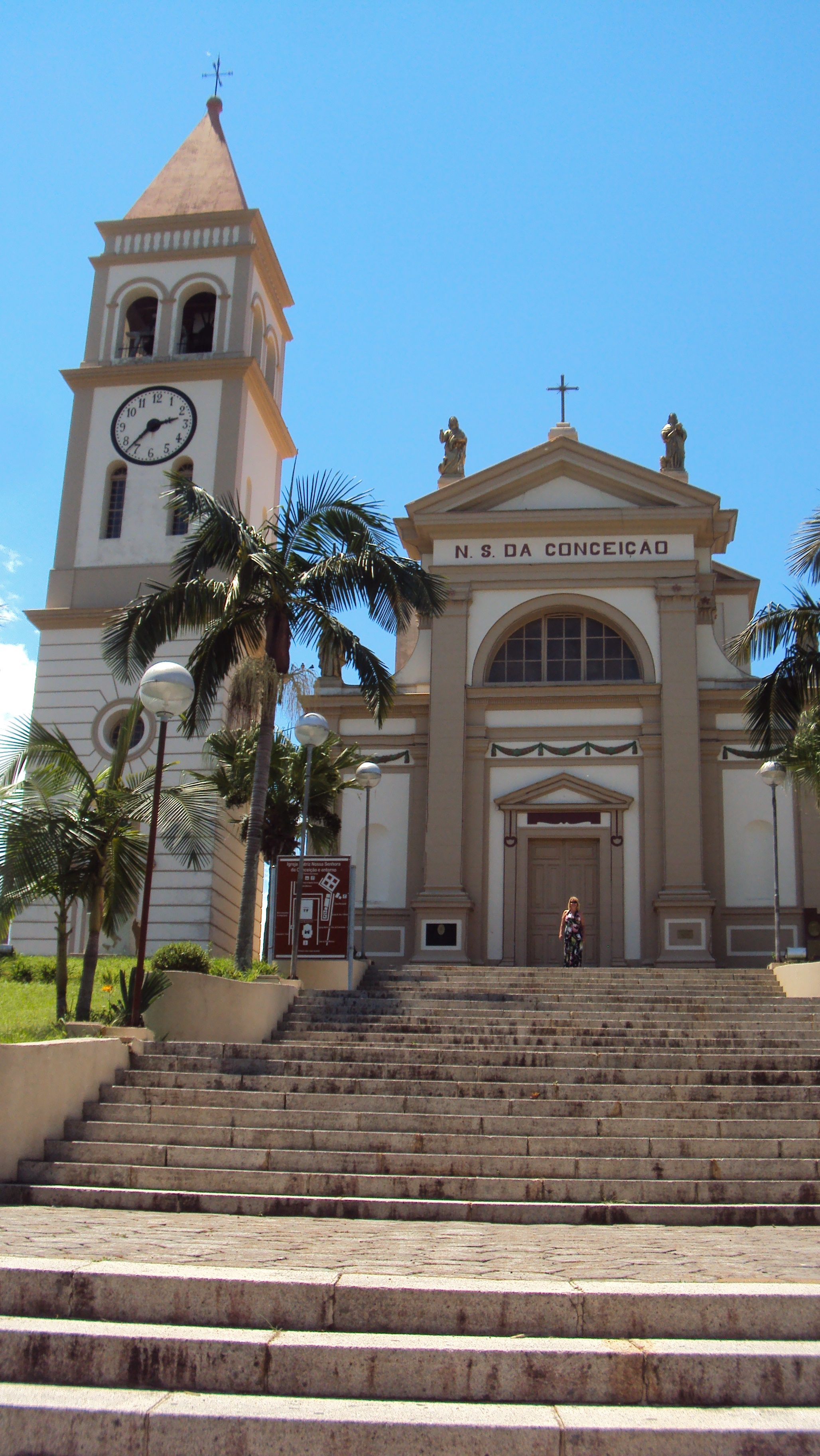 Igreja Matriz de Urussanga, 9 de fevereiro de 2014